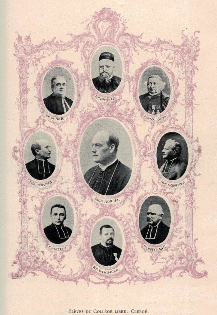 Elèves du collège libre - personnalités du clergé (édition de 1908)